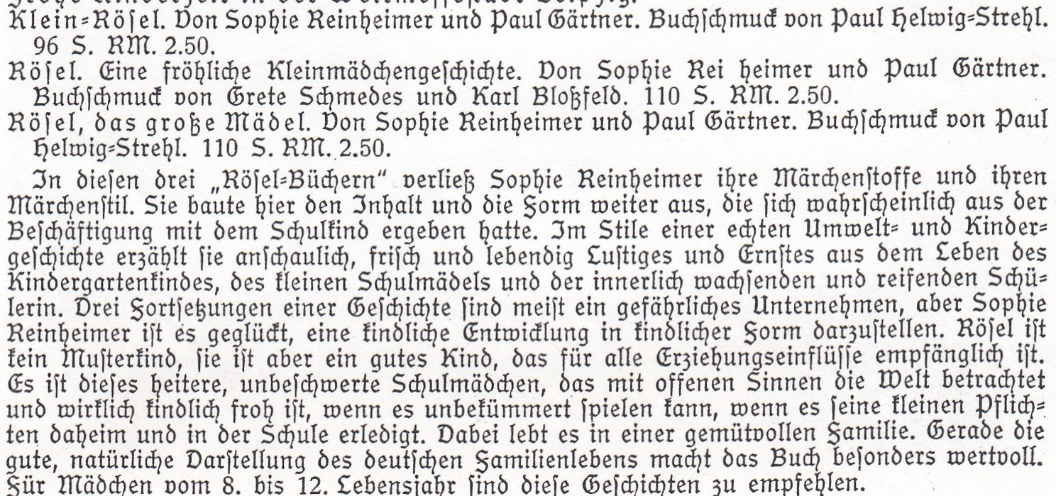 Rezension zu den Rössel-Bücher